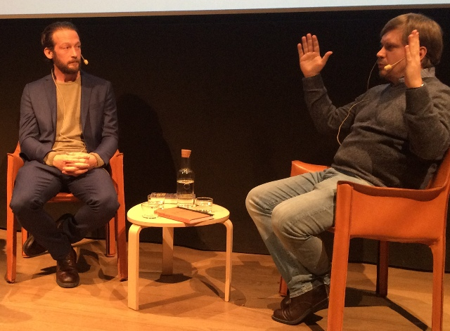 Bilden tagen under Stockholm Literature